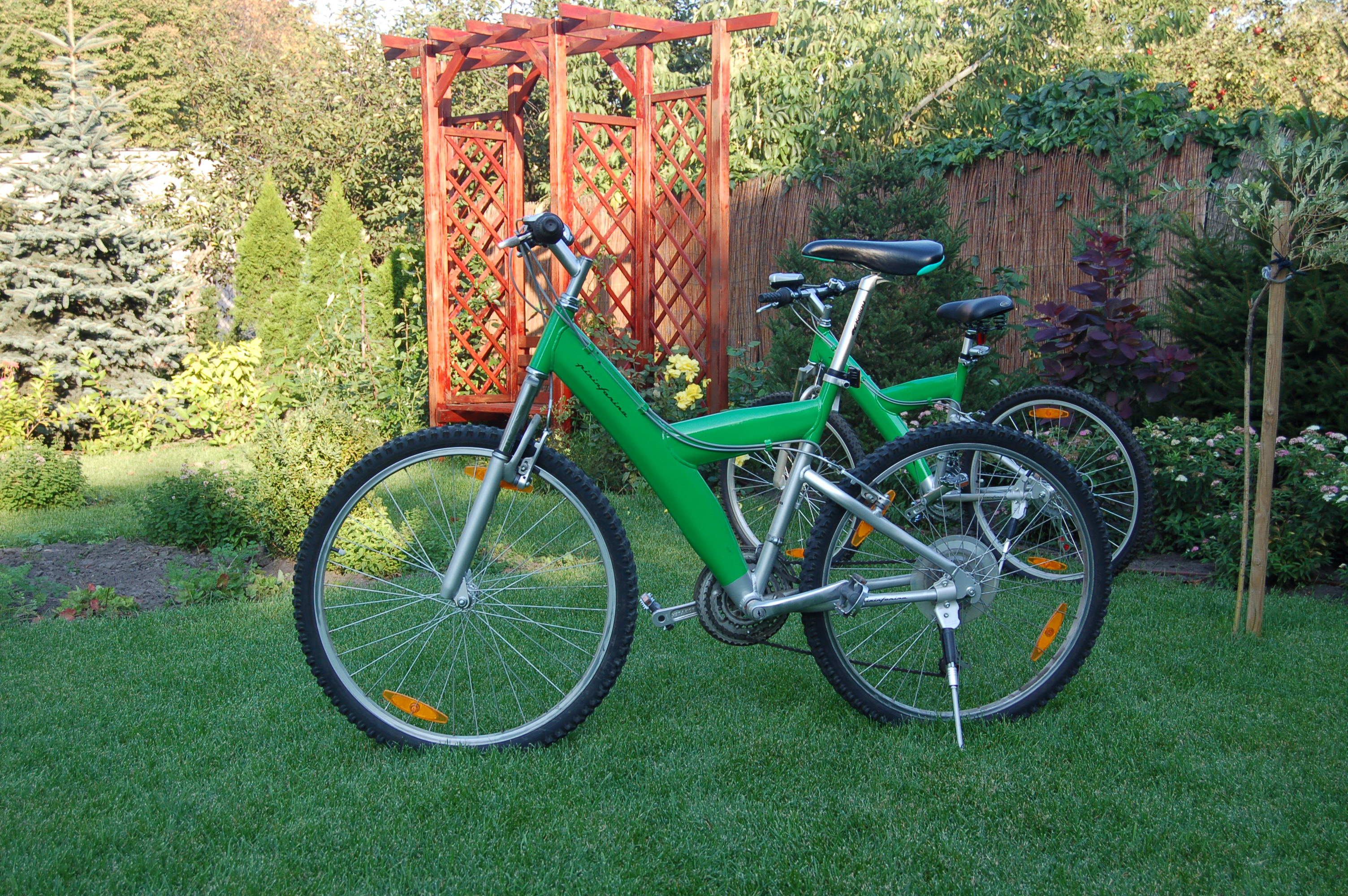 Pininfarina bike.